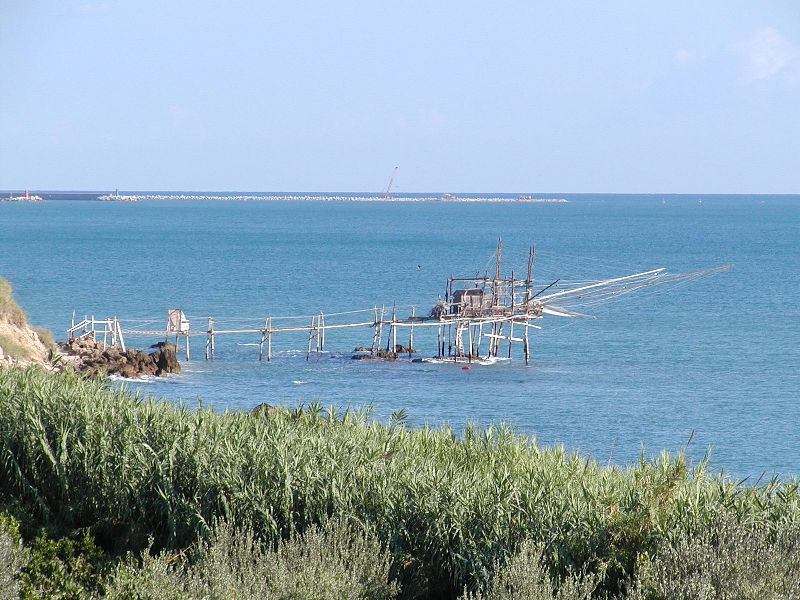 Ein Trabocci bei Ortona (San Vito)